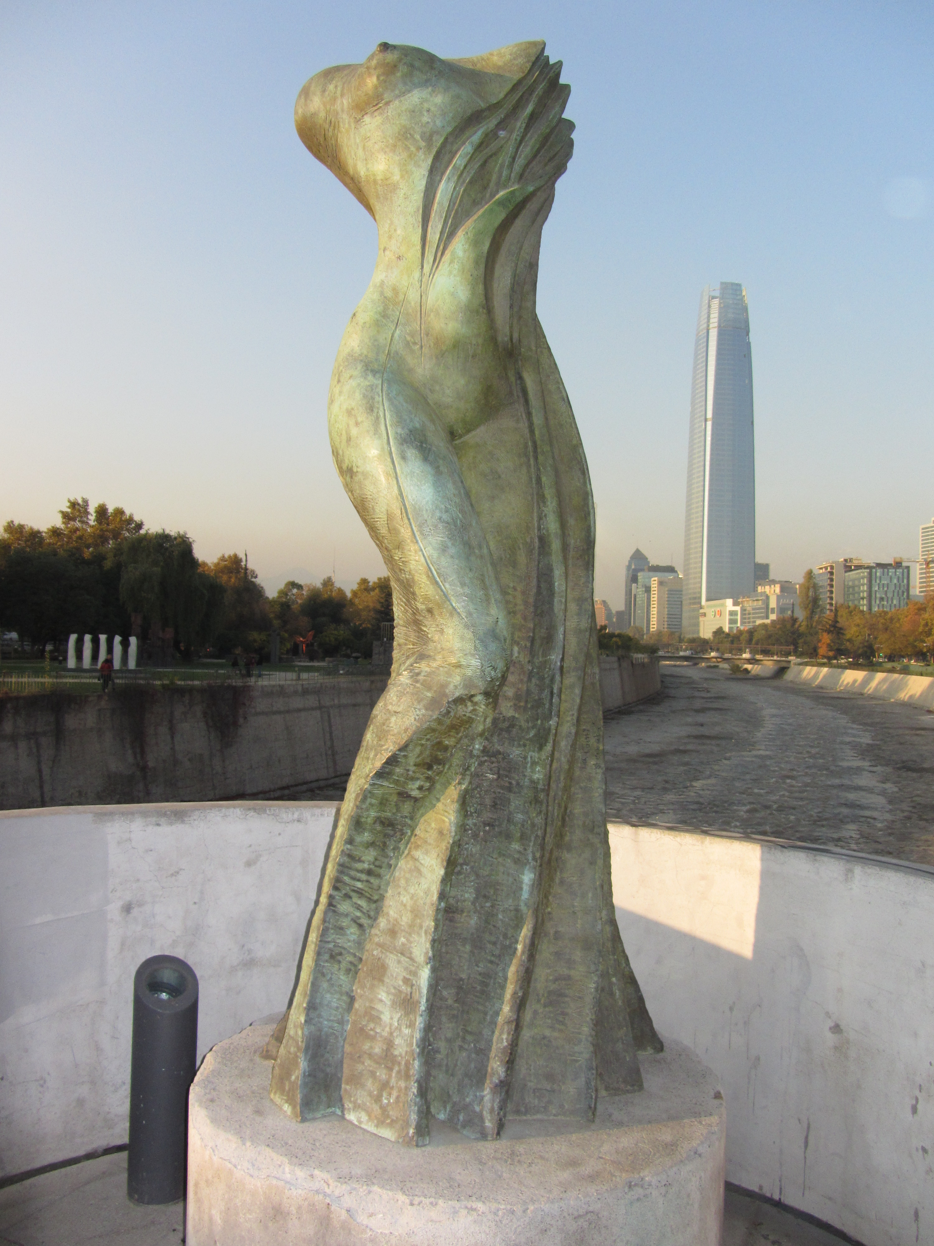 Mapuchuco, de Joaquín Mirauda; Parque de las Esculturas de Providencia